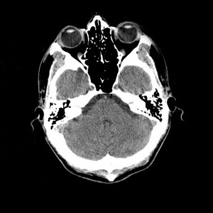 Tomografía Axial Computarizada